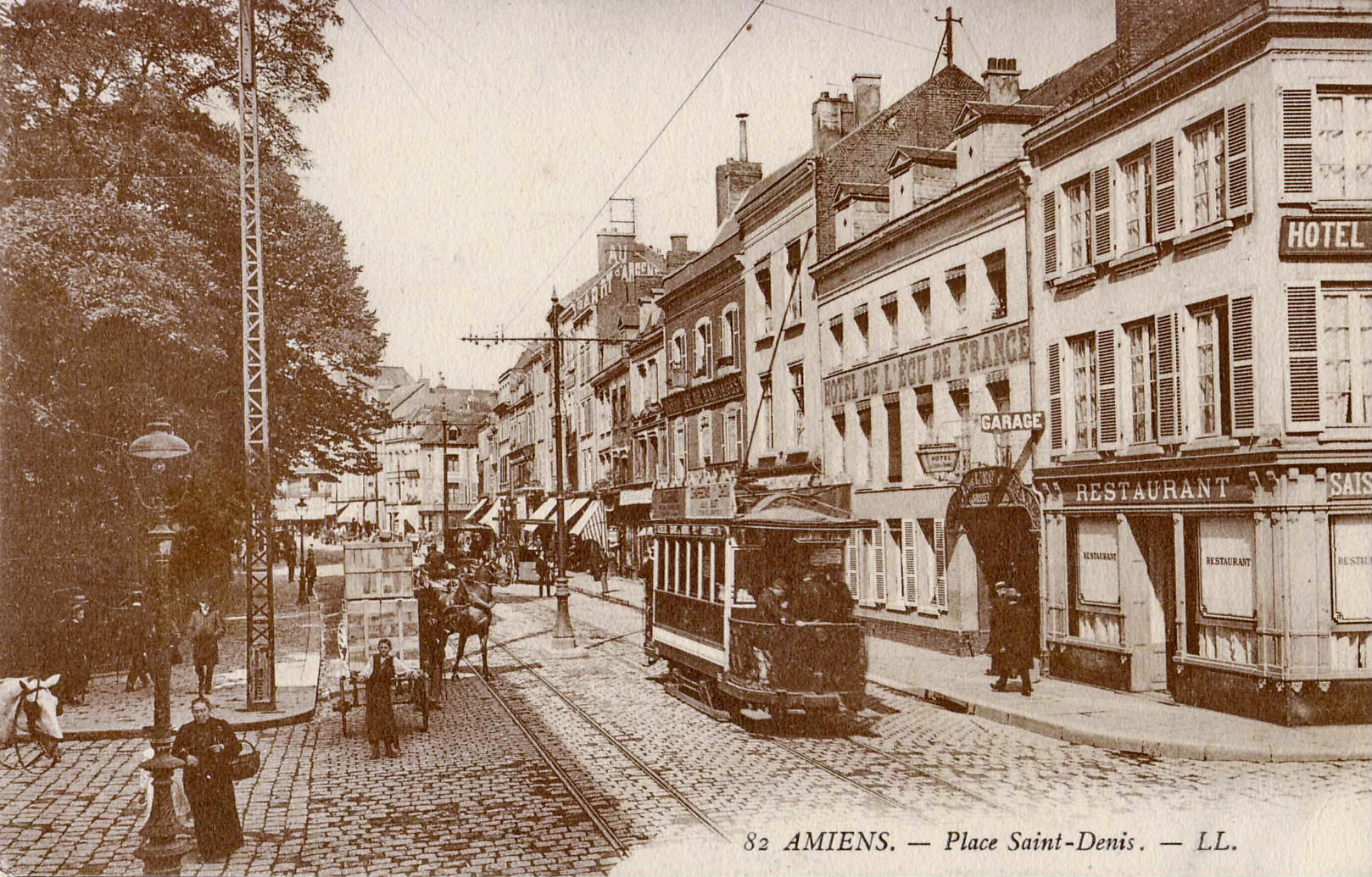 Carte postale ancienne éditée par LL, n°82 : AMIENS - Place Saint-Denis